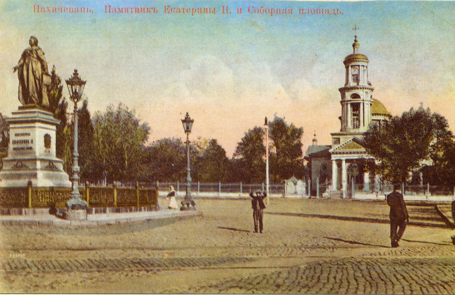 Памятник Екатерине II в Нахичевани-на-Дону на дореволюционной открытке.